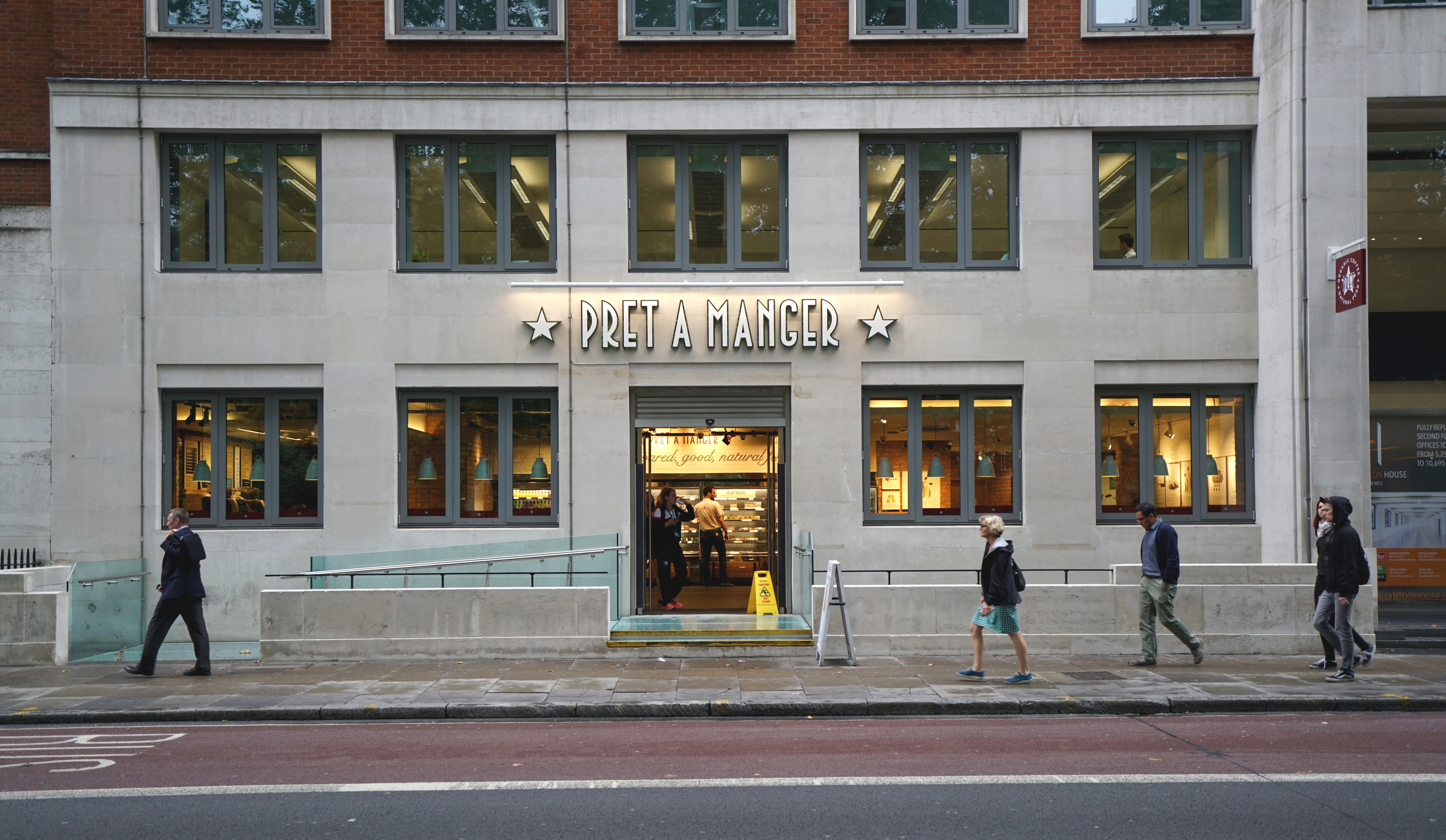 Eine Filiale der britischen Sandwichkette Pret a Manger am Tavistock Square in Bloomsbury im London Borough of Camden in London